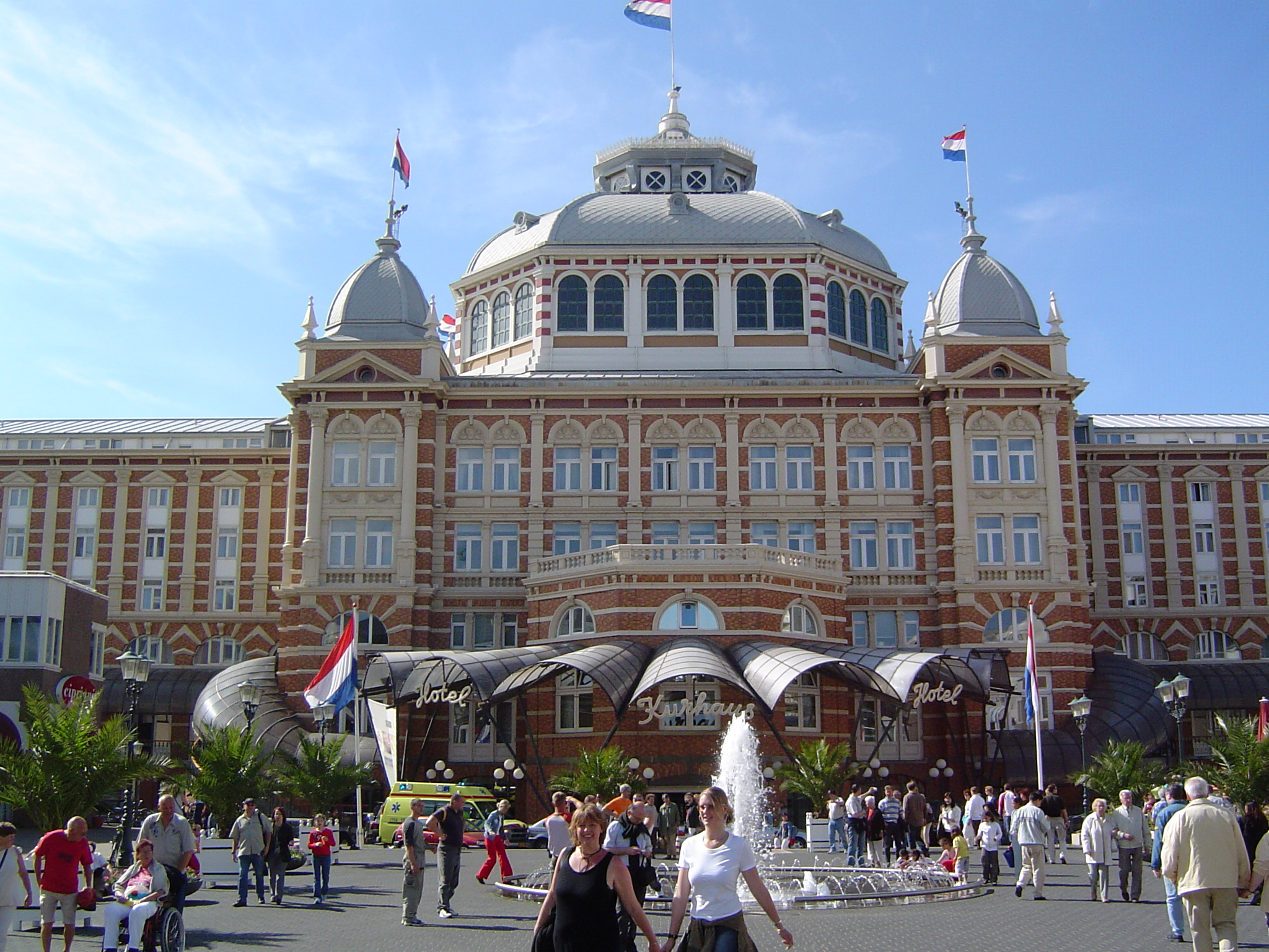 Kurhaus, Scheveningen Den Haag. Made by Joris 2004